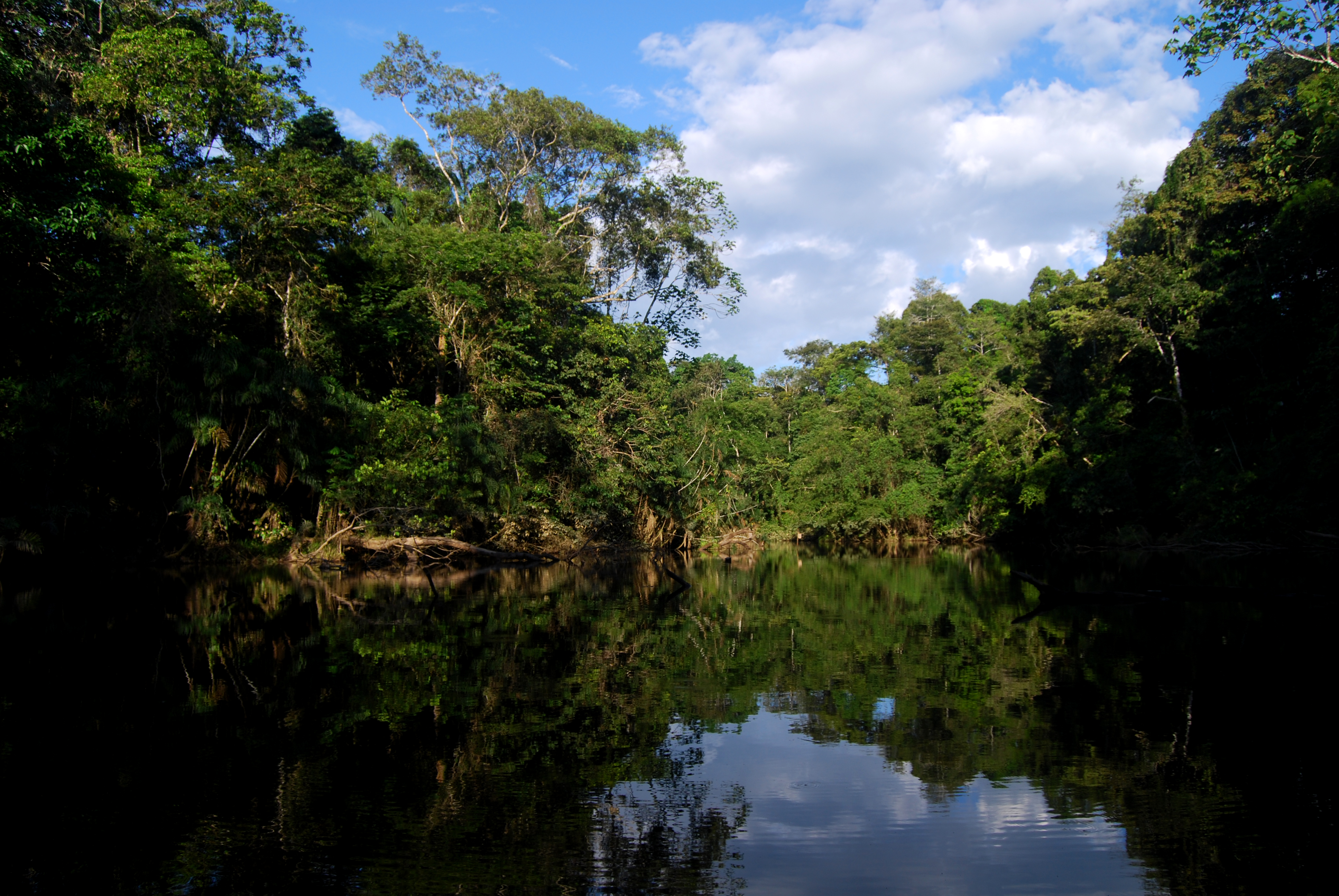 Oxbow lake, Yasuni